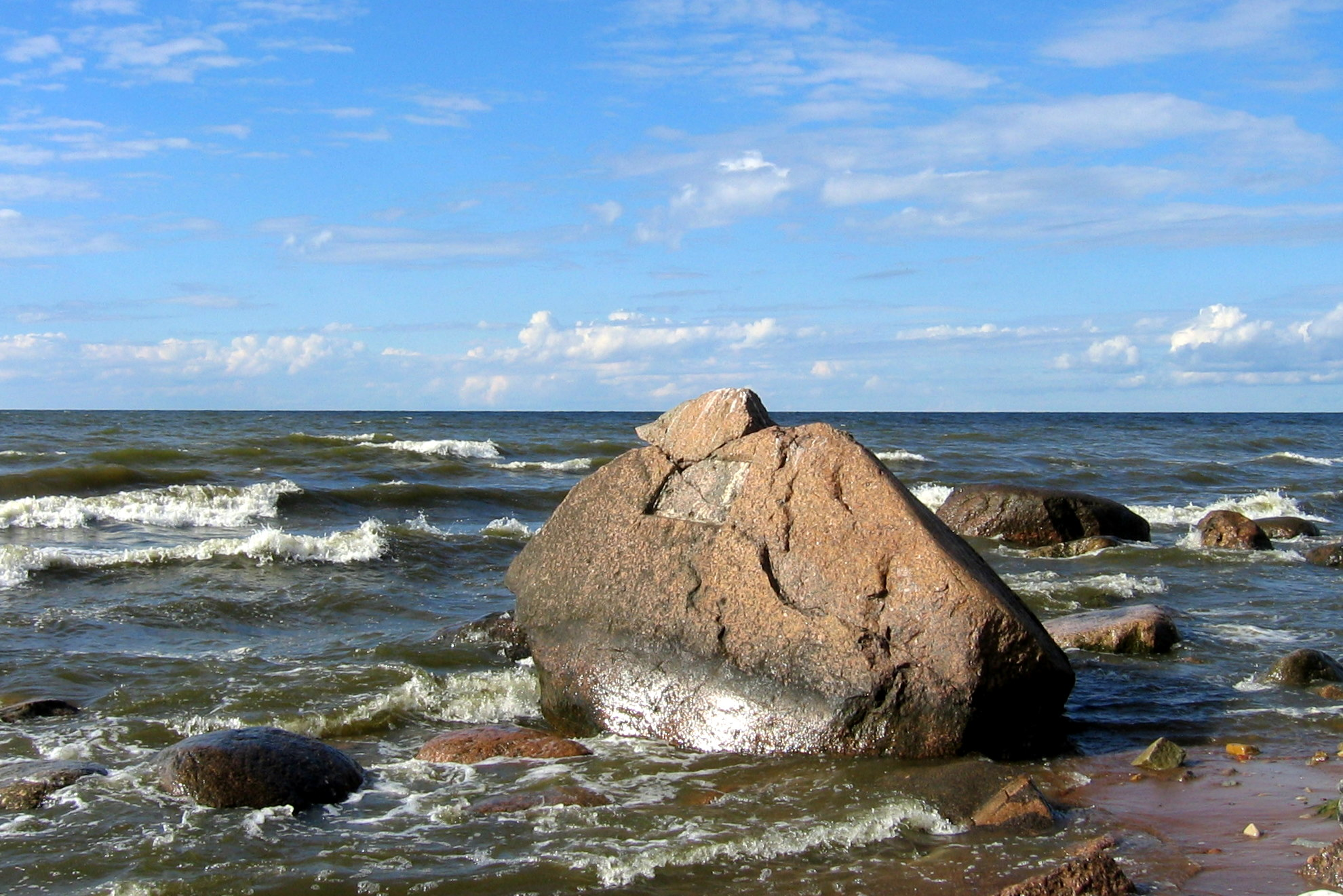 Utria dessandi esimese osa maabumiskoht, kuhu hiljem paigaldati mälestustahvel.